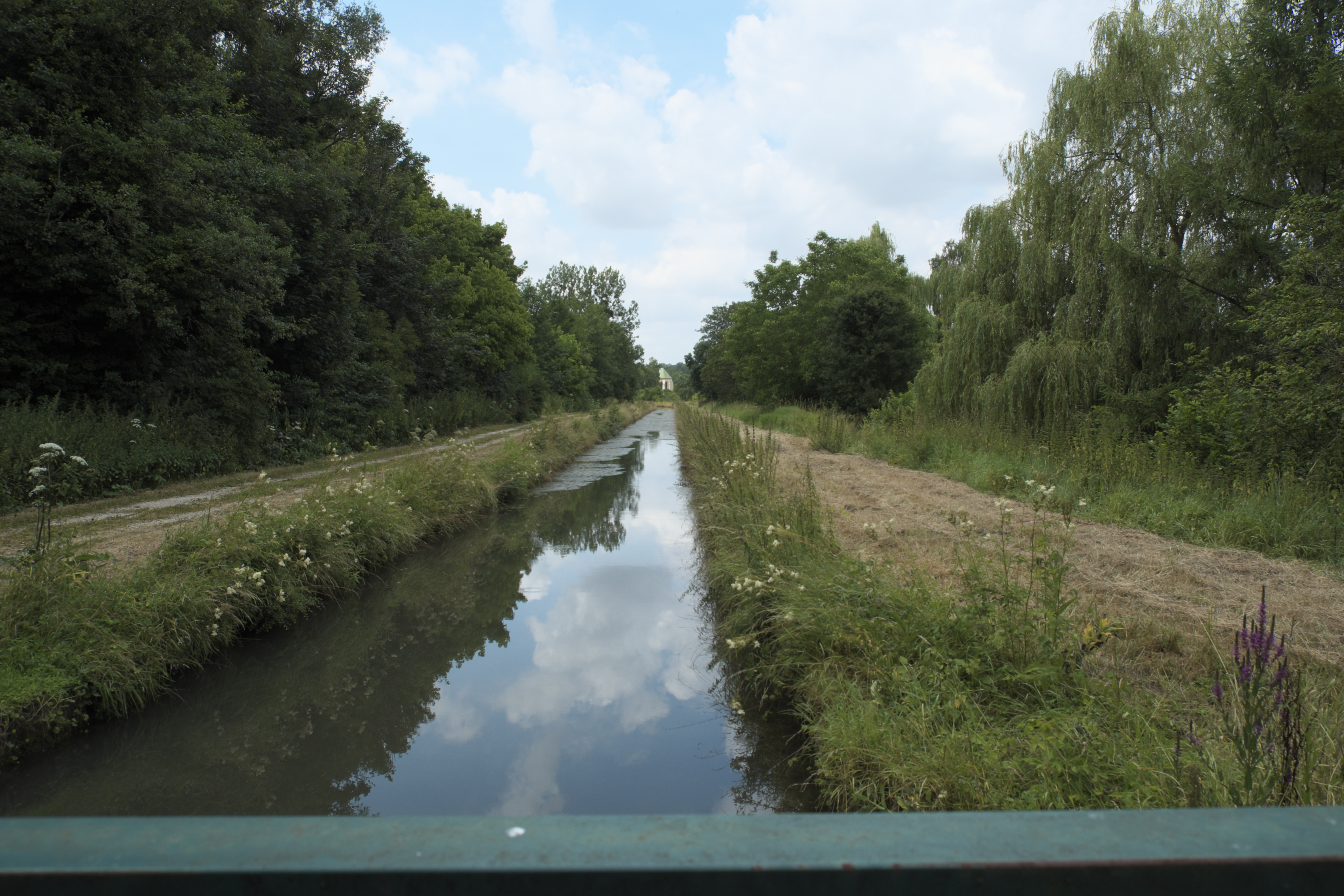 Canal du Clignon bei Montigny-l’Allier im Département Aisne (Region Hauts-de-France/Frankreich)